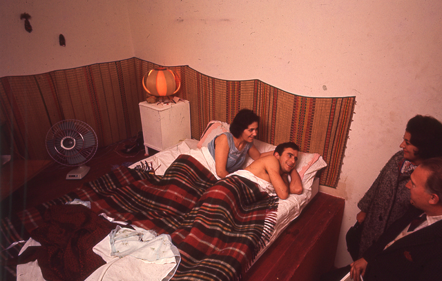 Vista de La Menesunda, obra de Marta Minujín y Rubén Santantonín en el Instituto di Tella, mayo de 1965.